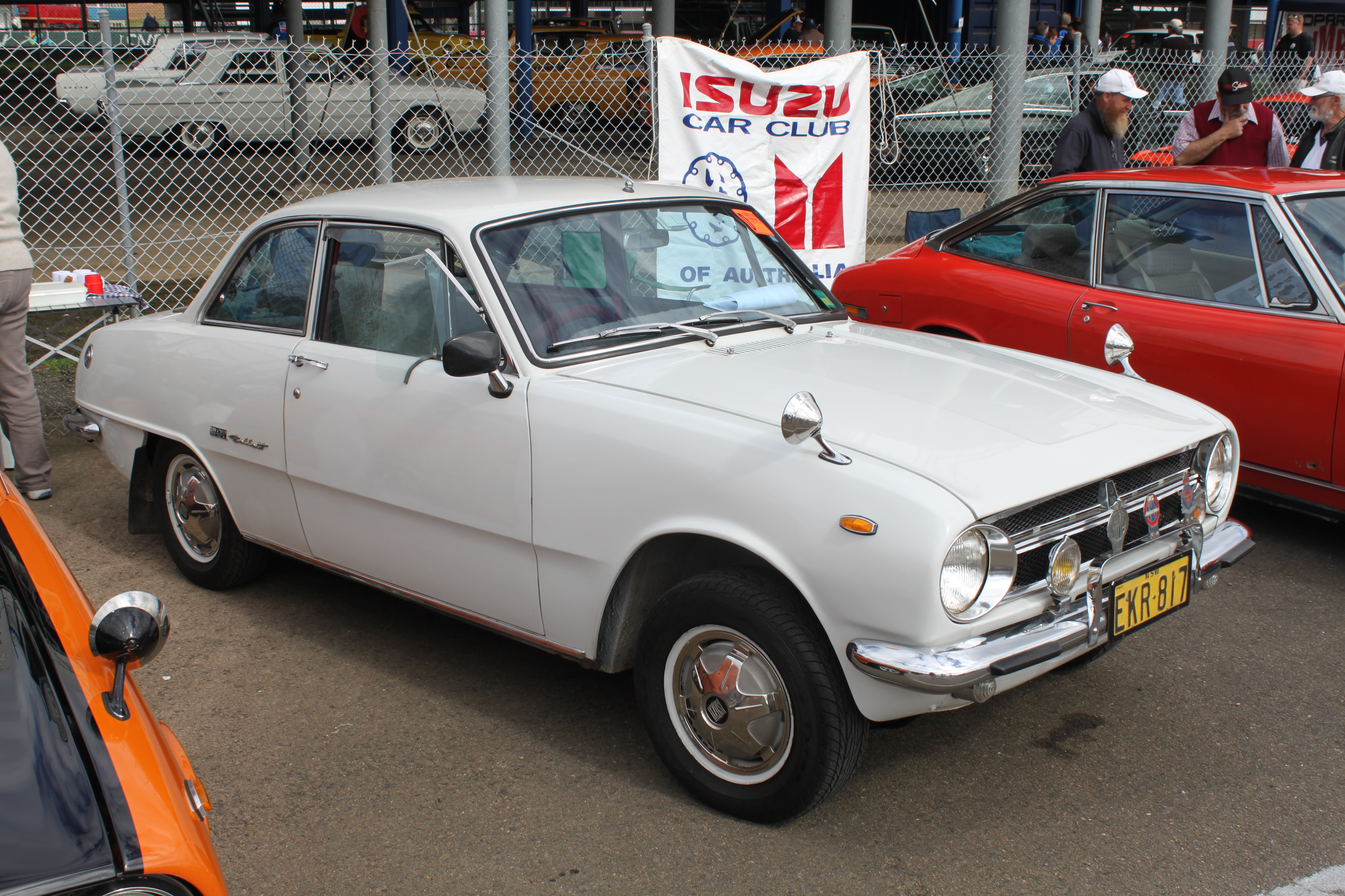 Isuzu Bellett 1600 GT